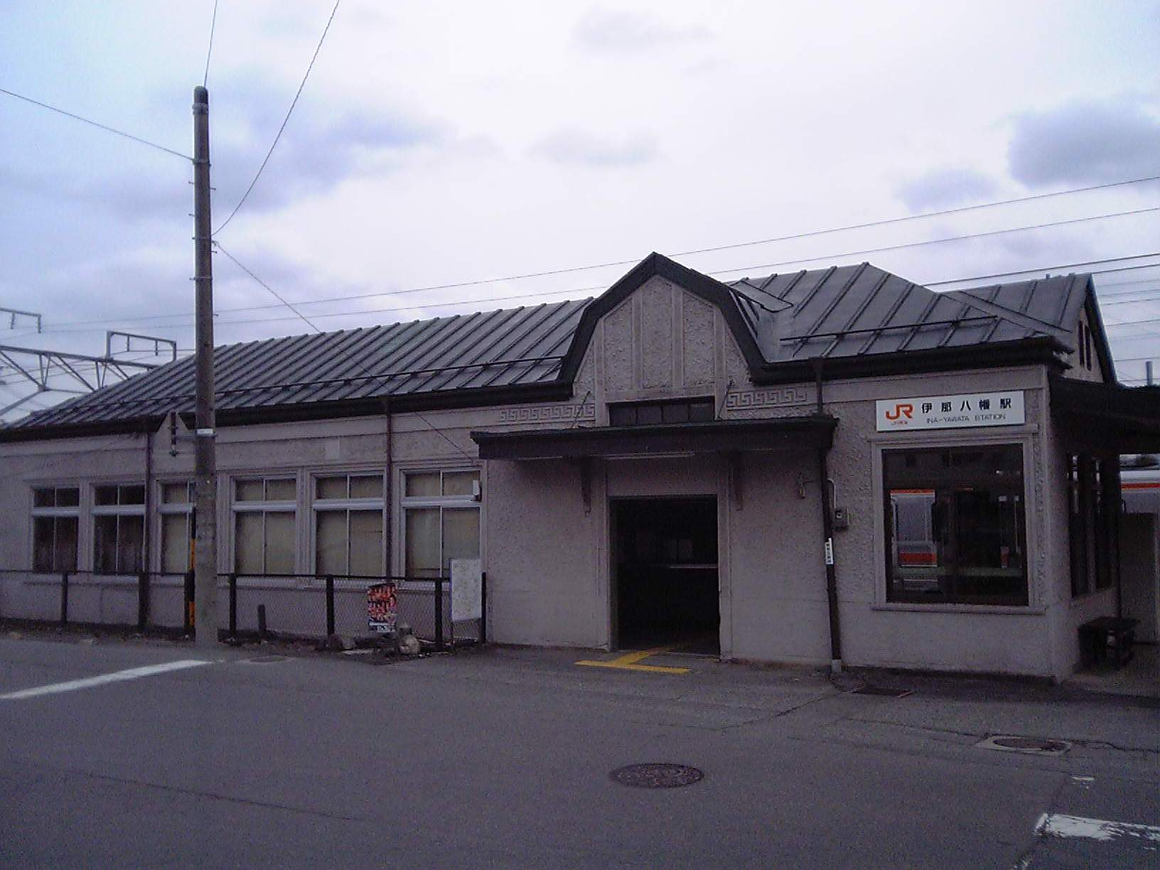 伊那八幡駅